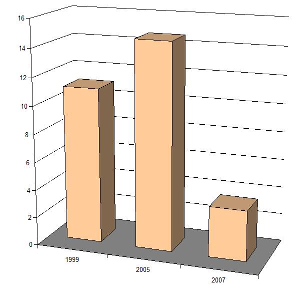 Proportion de retraités dans la population de Coupru (Aisne, France).